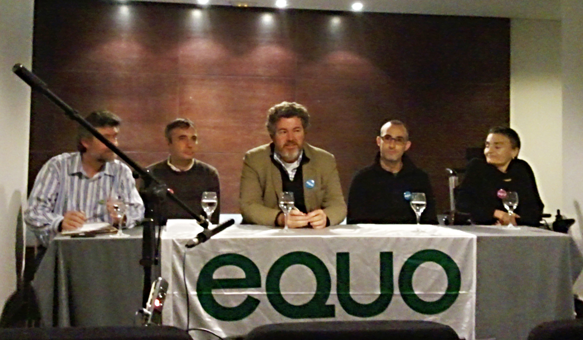 Juan López de Uralde, no centro, nunha comparecencia do partido político Equo en Santiago de Compostela.